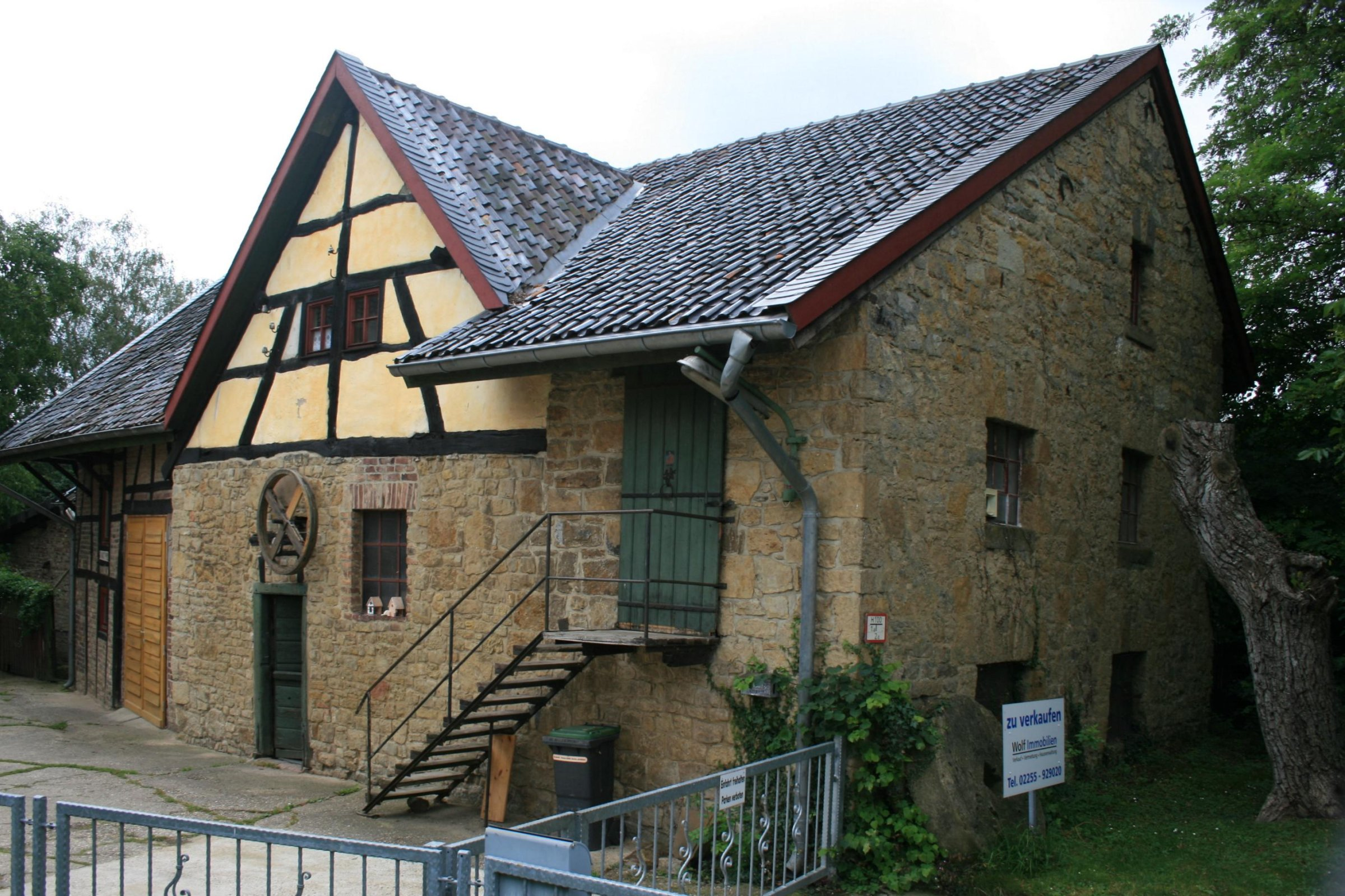 Denkmal Nr. 89 in Nideggen-Embken